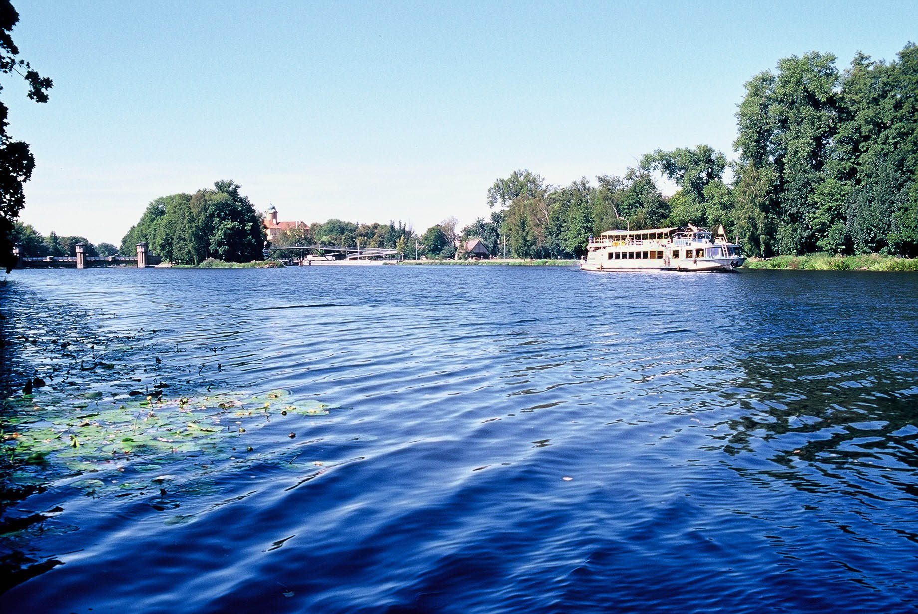 Parník Král Jiří vyplouvá ze zdymadla v Poděbradech. V pozadí zámek, lávka přes zdymadlo a hydroelektrárna architekta Antonína Engela.